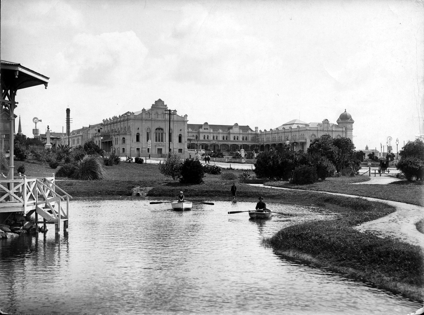 Hotel Bristol, Mar del Plata, Marzo de 1907